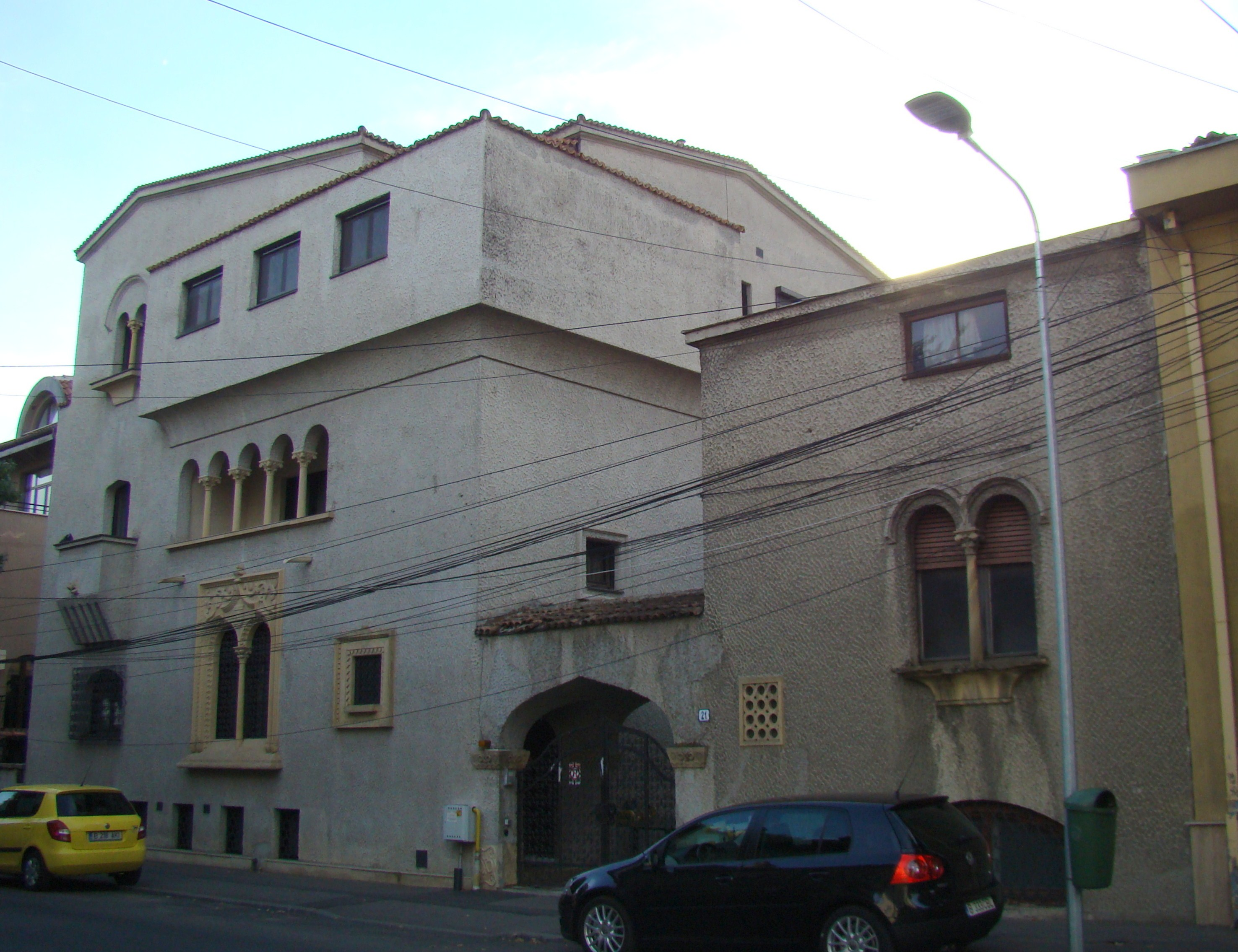 Clădire monument istoric, str. Paris, nr 21